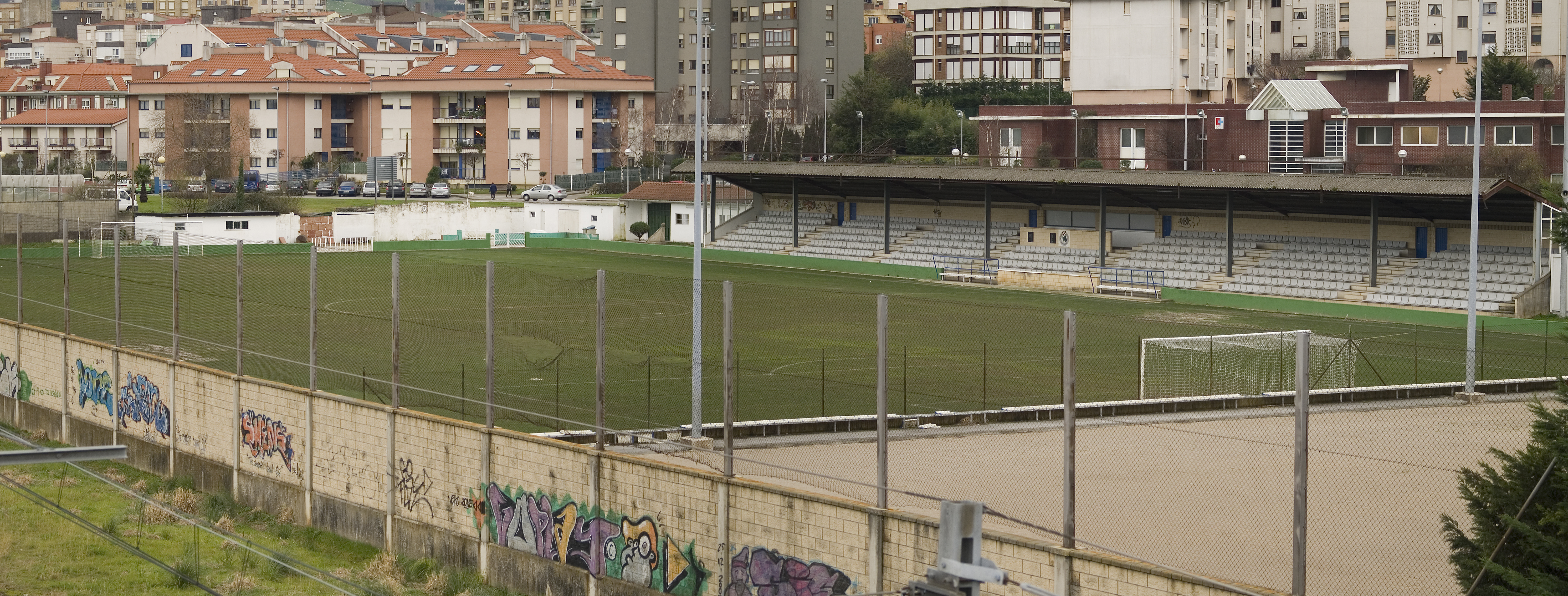 Estadio del equipo de fútbol "Unión Club" de El Astillero (Cantabria).